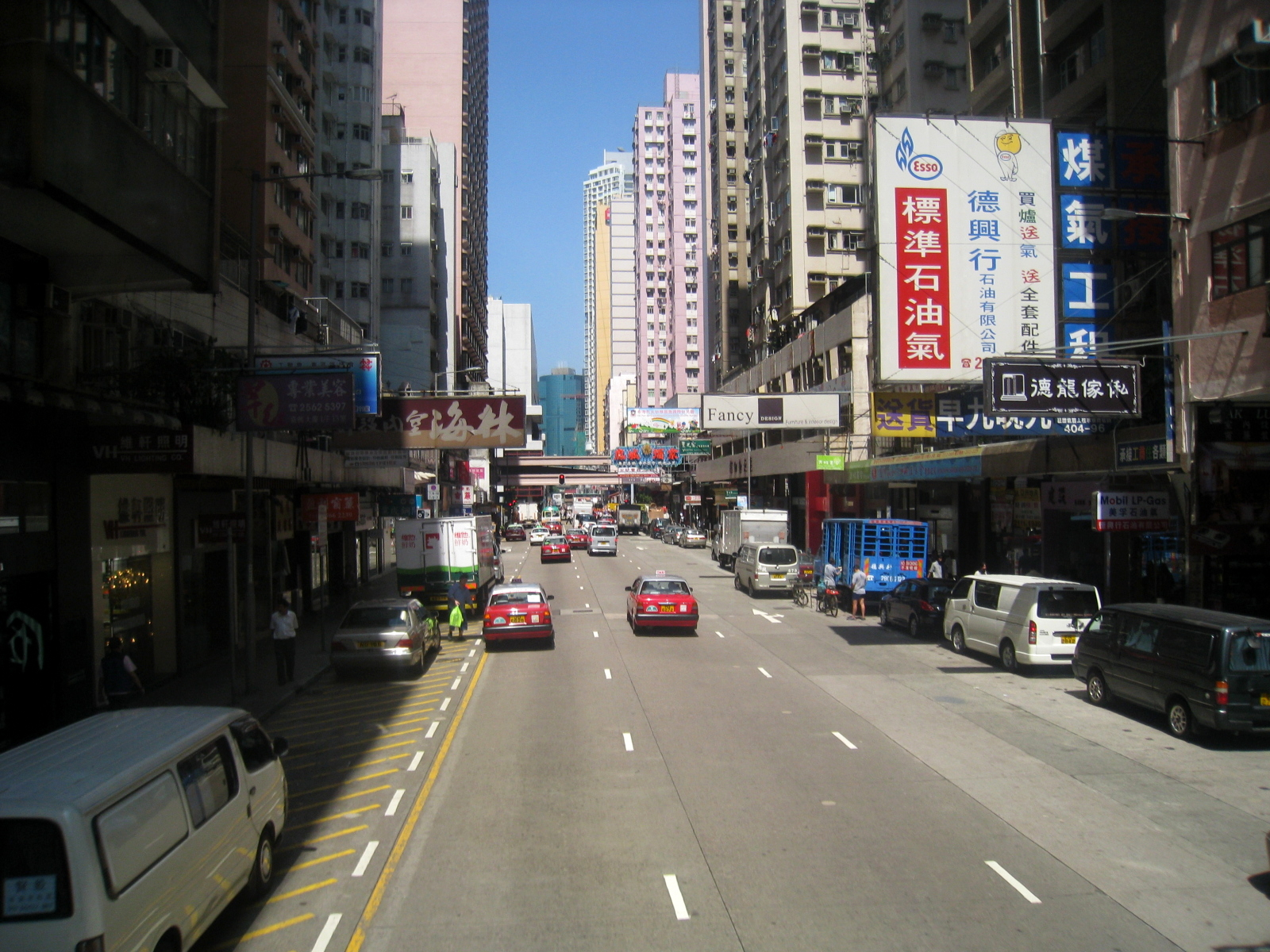 HK Java Road 渣華道